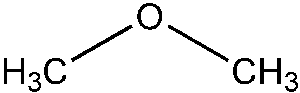 Struktur von Dimethylether